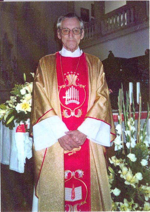 Pier Antonio Bellina